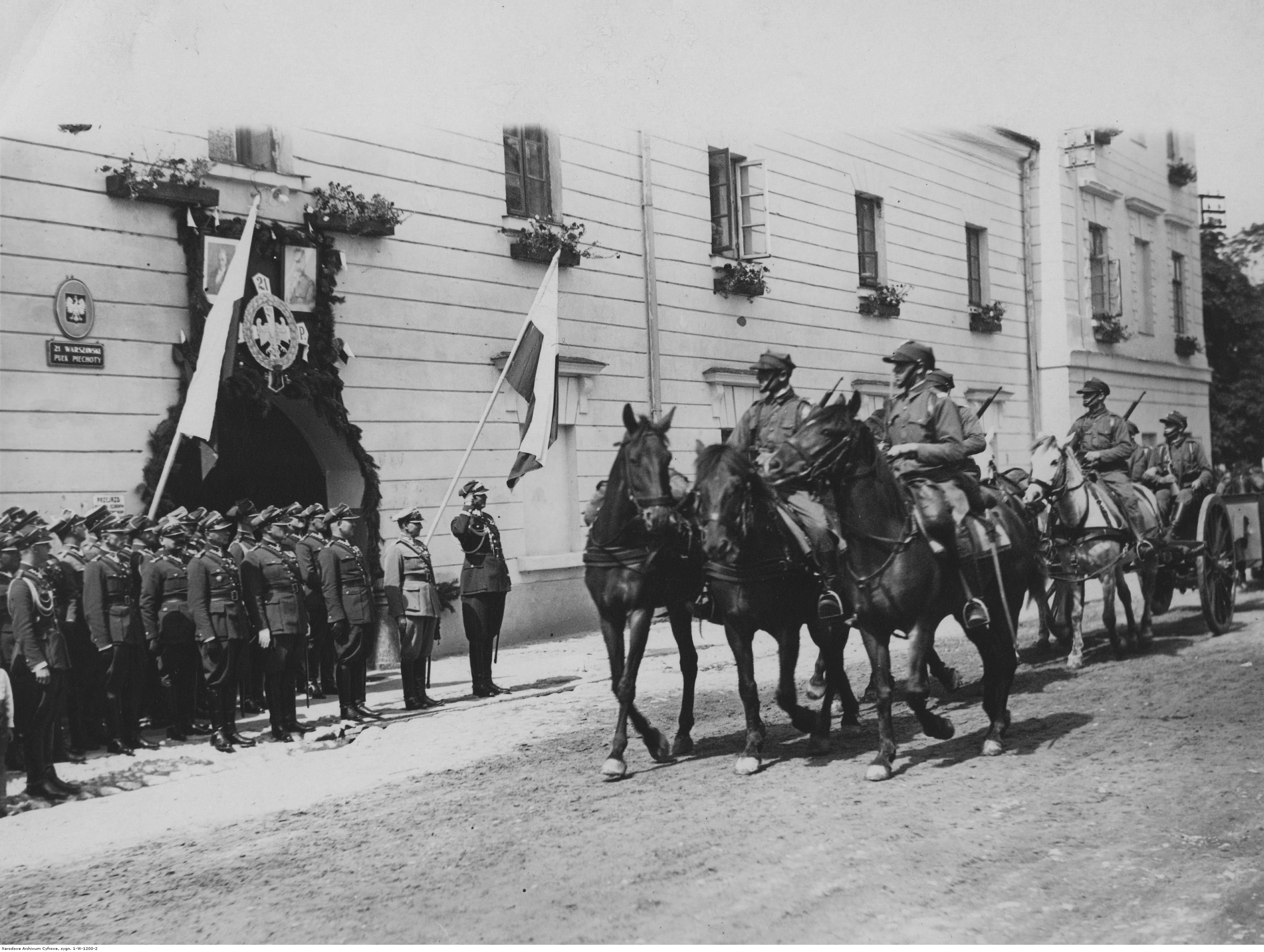 Święto 21 pułku piechoty w Warszawie; sierpień 1931. Defiladę pułku przed siedzibą przyjmuje gen. Antoni Szylling (1 z prawej). Koncern Ilustrowany Kurier Codzienny - Archiwum Ilustracji. Sygnatura: 1-W-1200-2